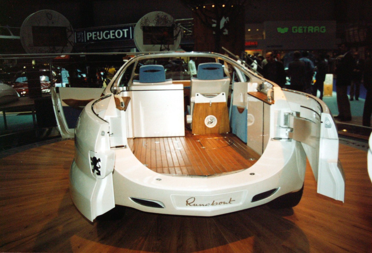 Quelle: selbst fotografiert auf der IAA 1997 Fotograf: Späth Chr.